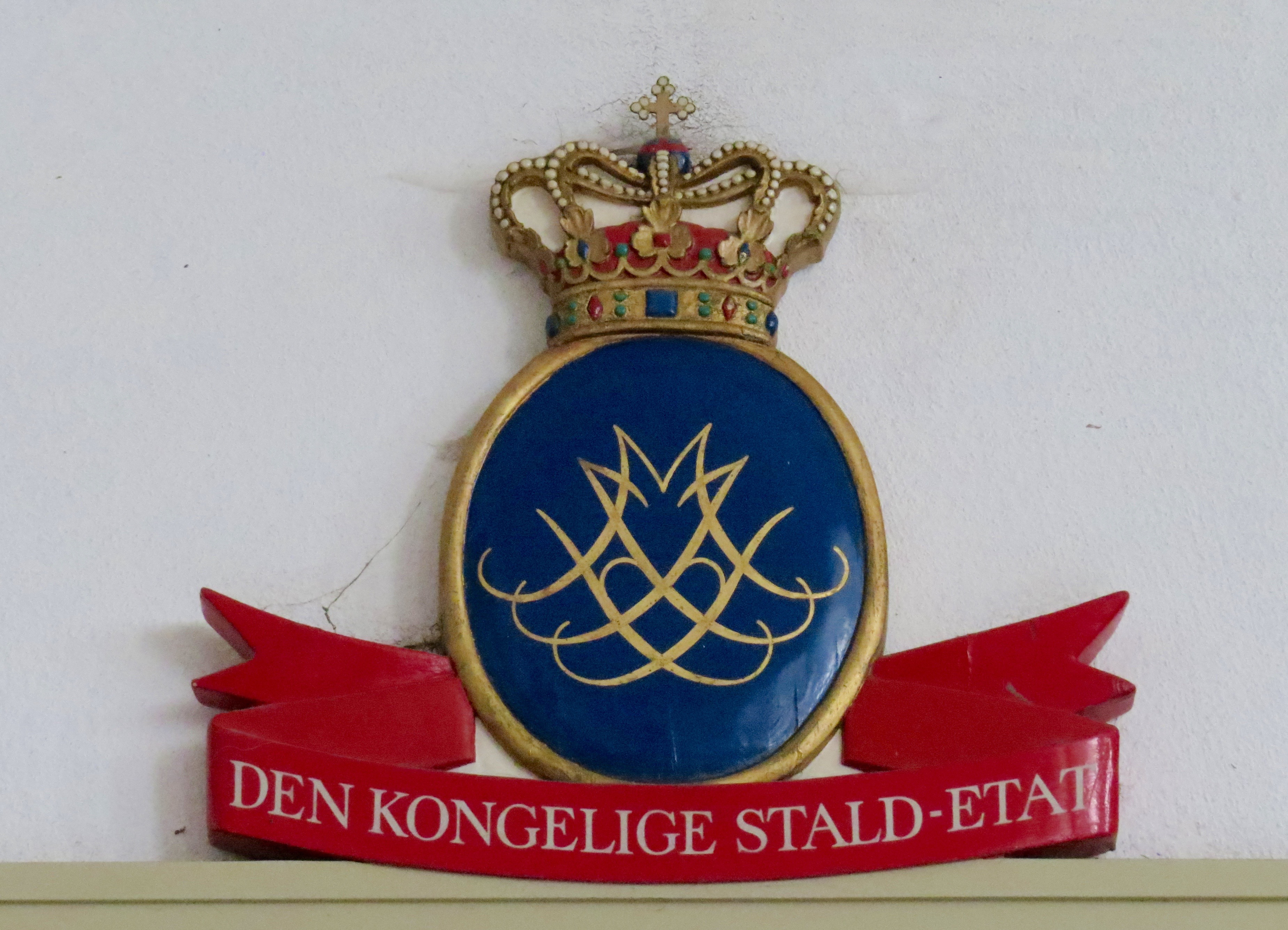 Den Kongelige Stald-Etat med dronning Margrethe II og prins Henriks dobbeltmonogram, Christiansborg, København